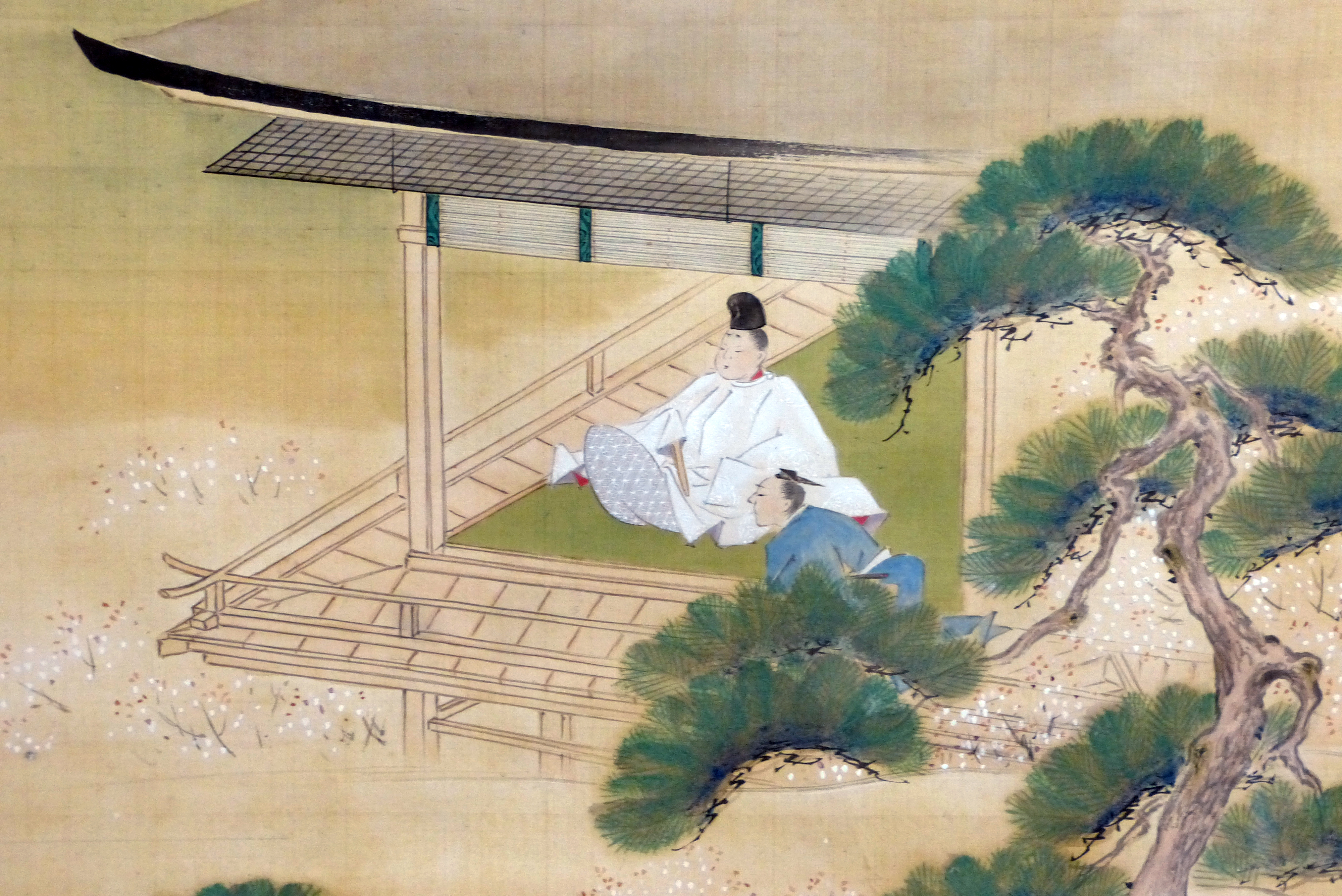 井伊谷城図 深奥山方広寺蔵